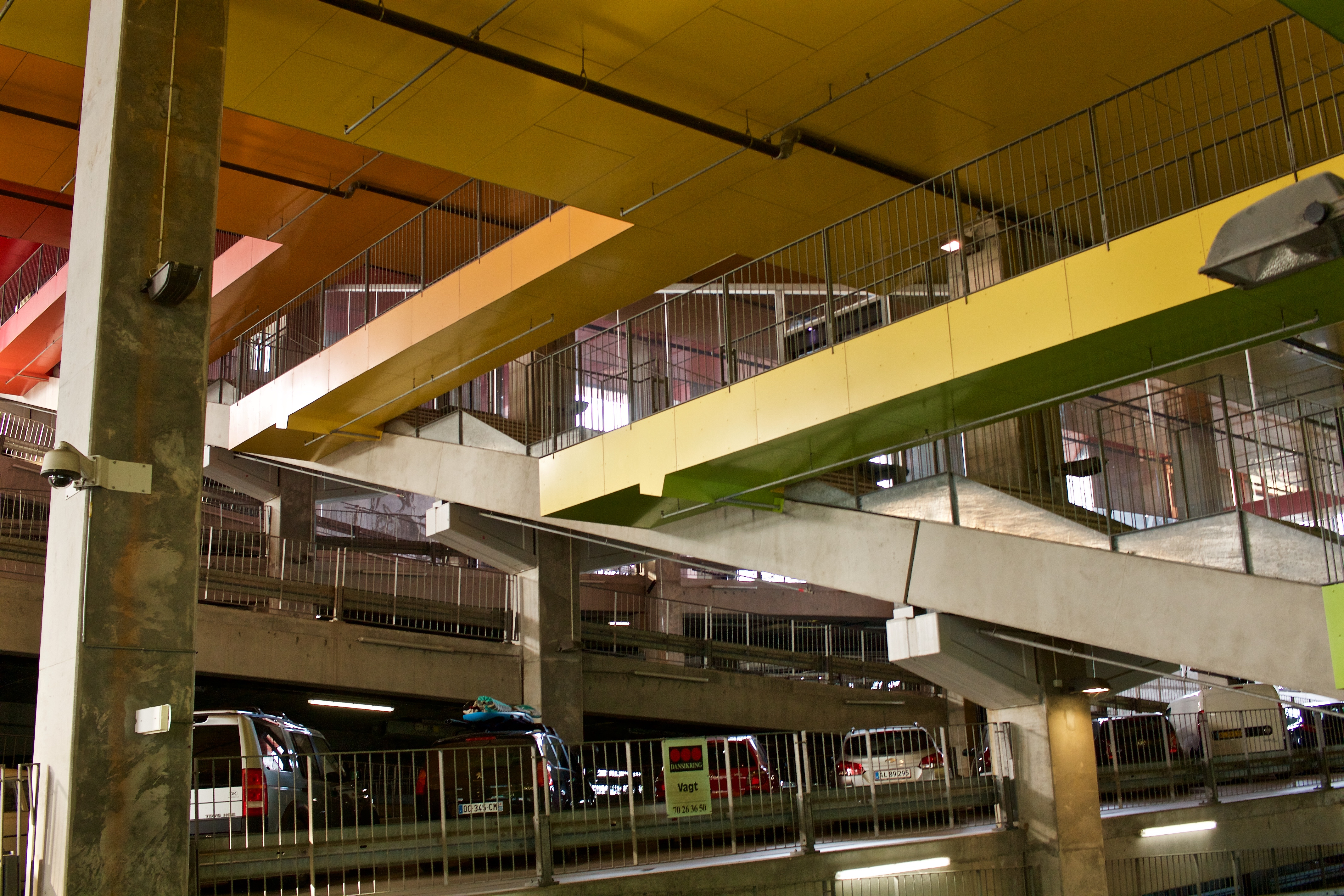 VM Mountain Dwellings, Ørestad, Copenhagen, Denmark